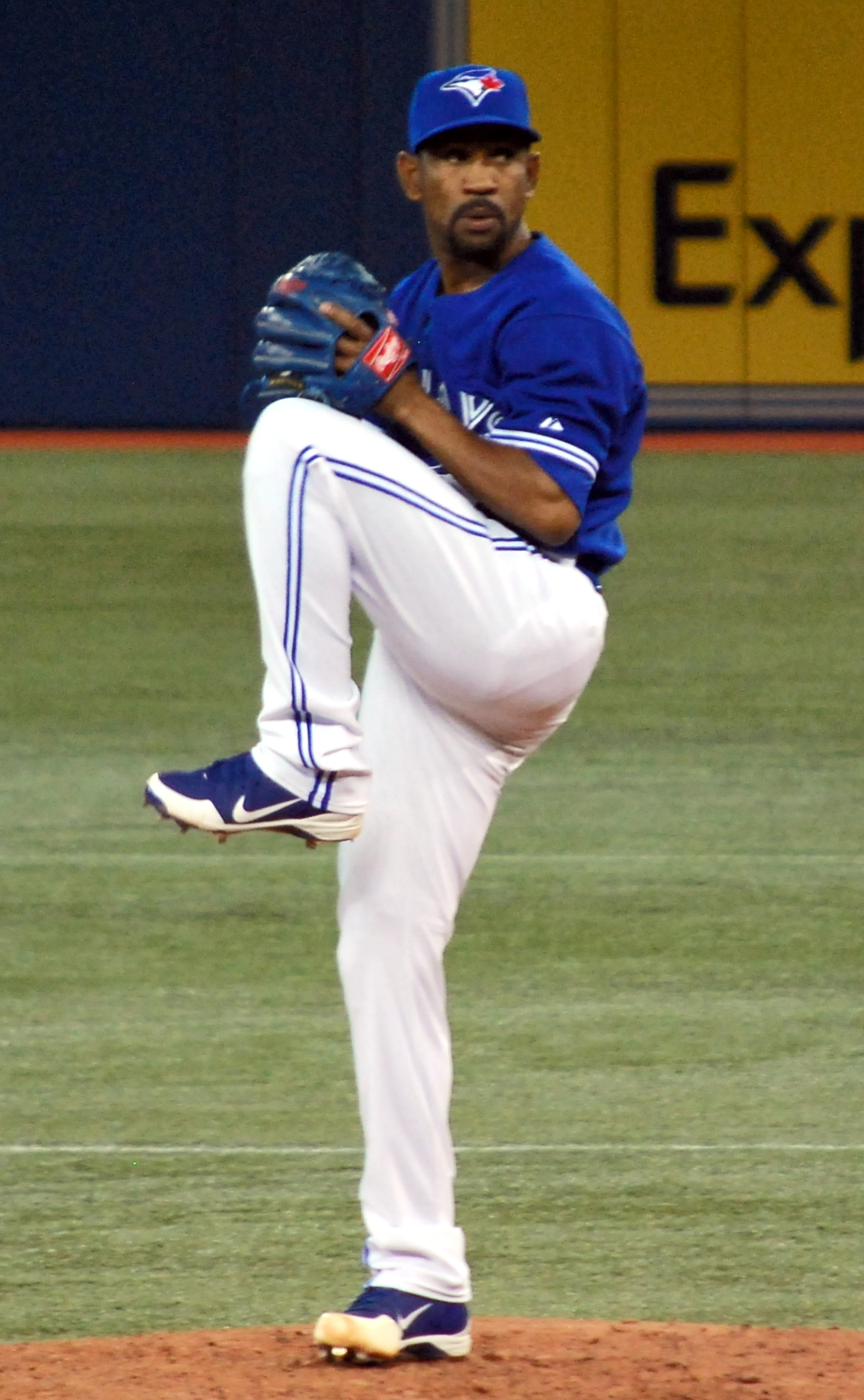 Ramón Ortiz